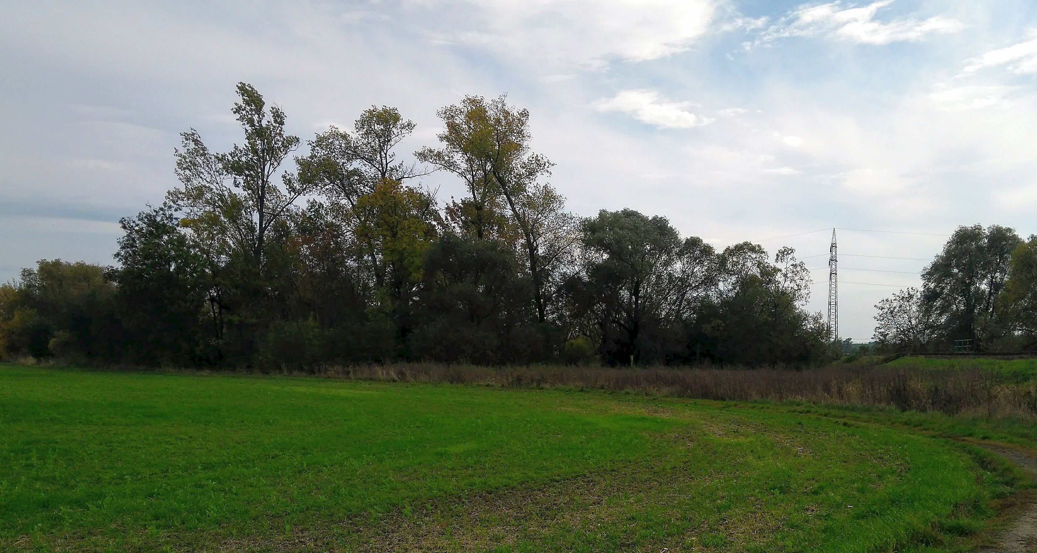 Kojetín